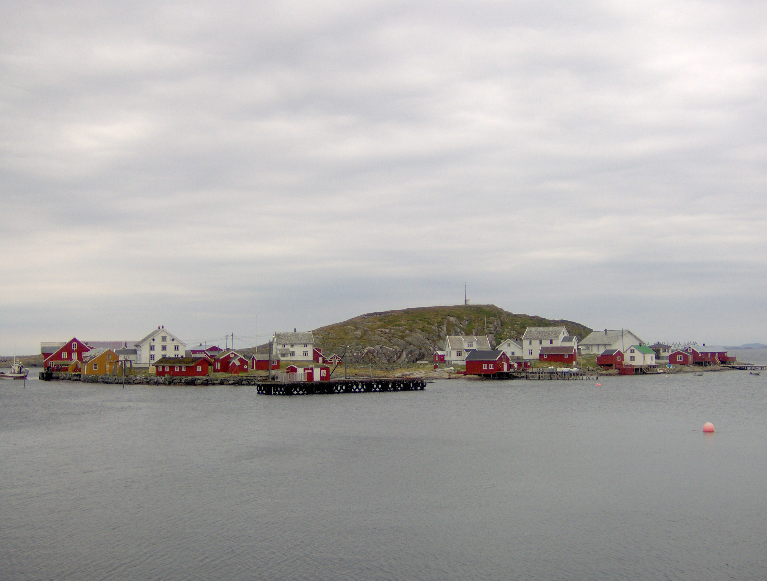 Heimværet, the largest island of Sør-Gjæslingan